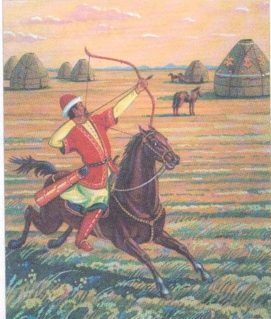 Татарча/tatarça: Төрек атучысы